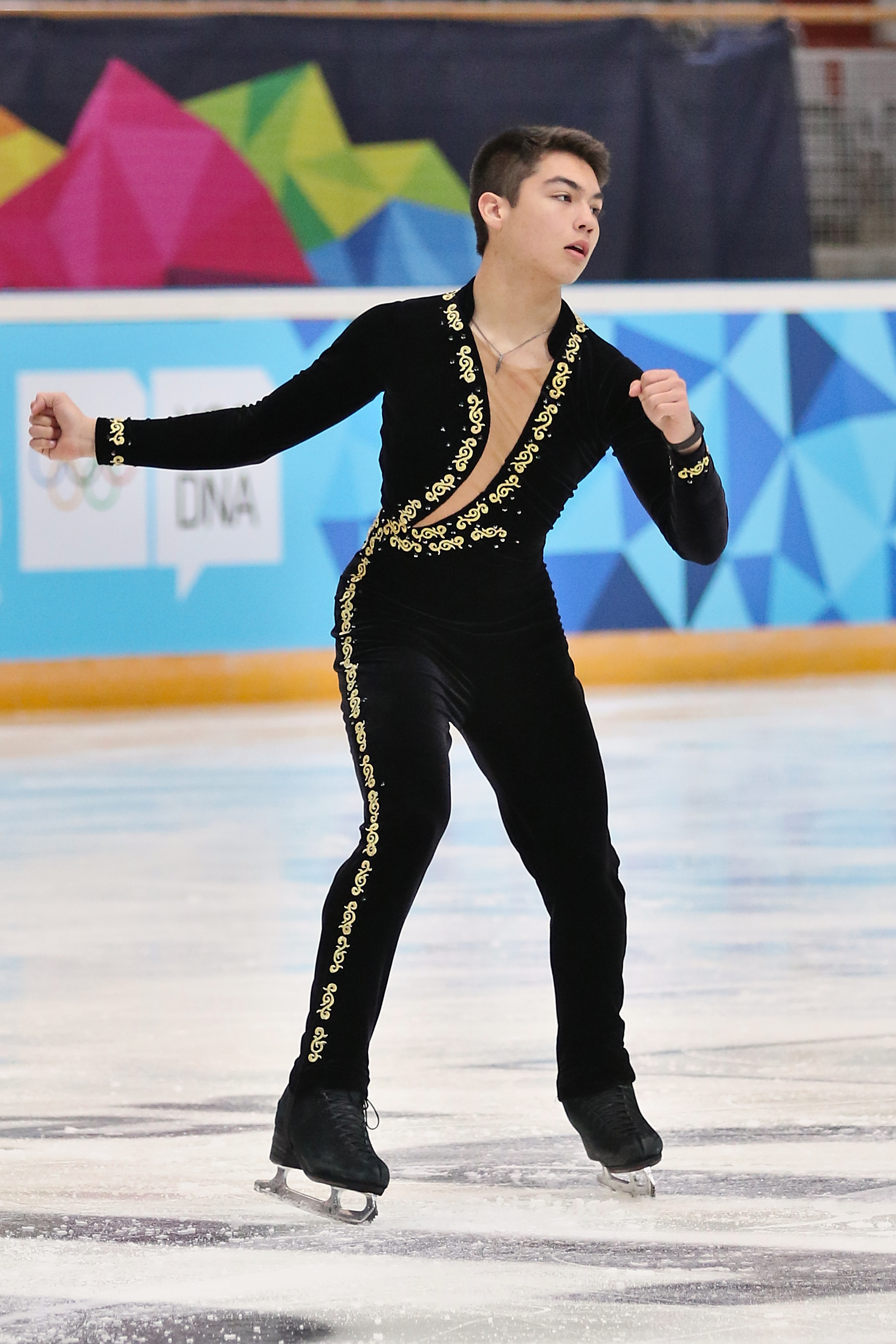 Lillehammer 2016 - Figure Skating Men Short Program - Camden Pulkinen